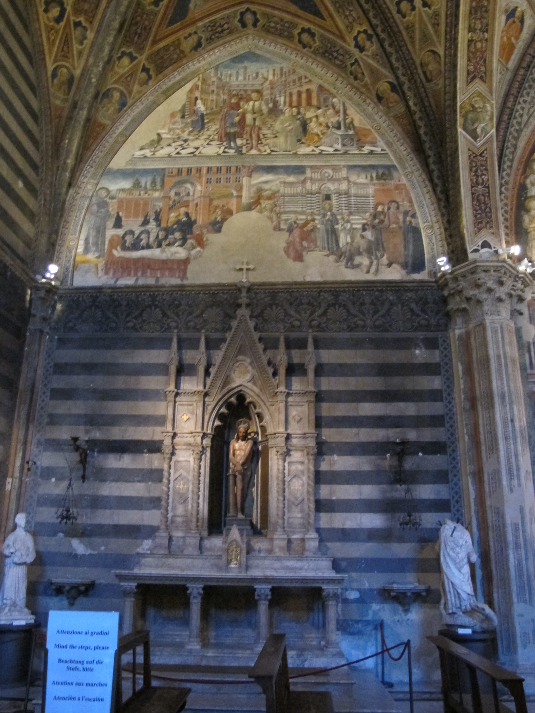 Battistero di siena, parete 05 con miracoli di s. antonio